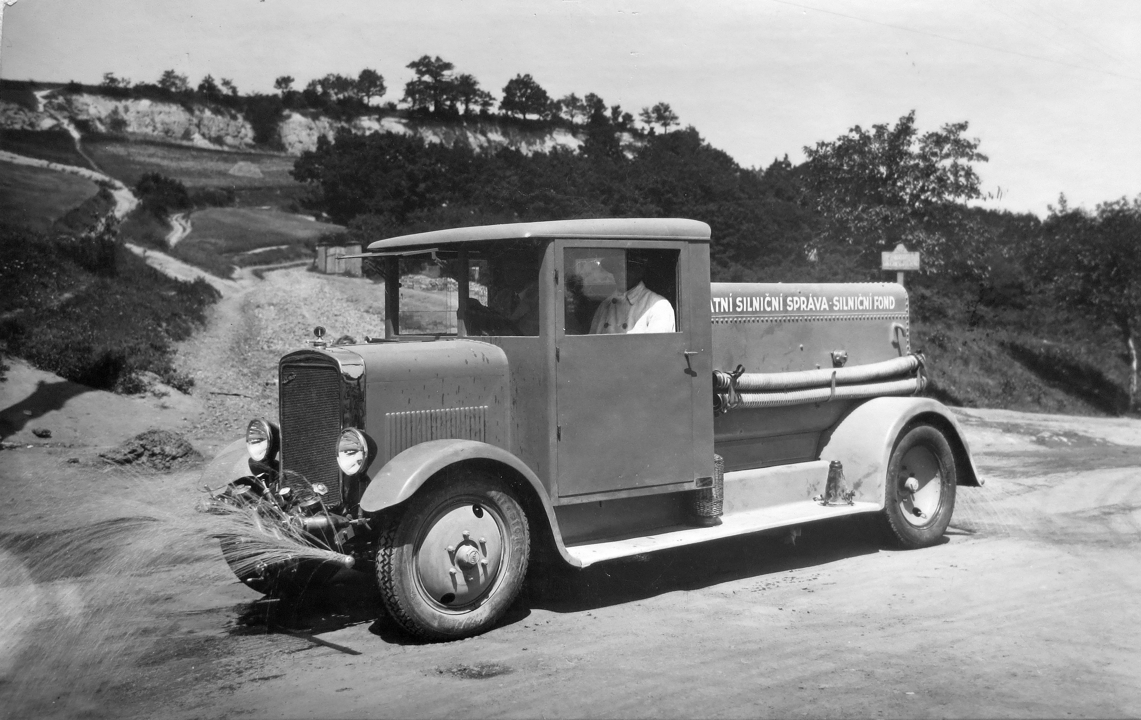 Walter Comercial kropící (1931)